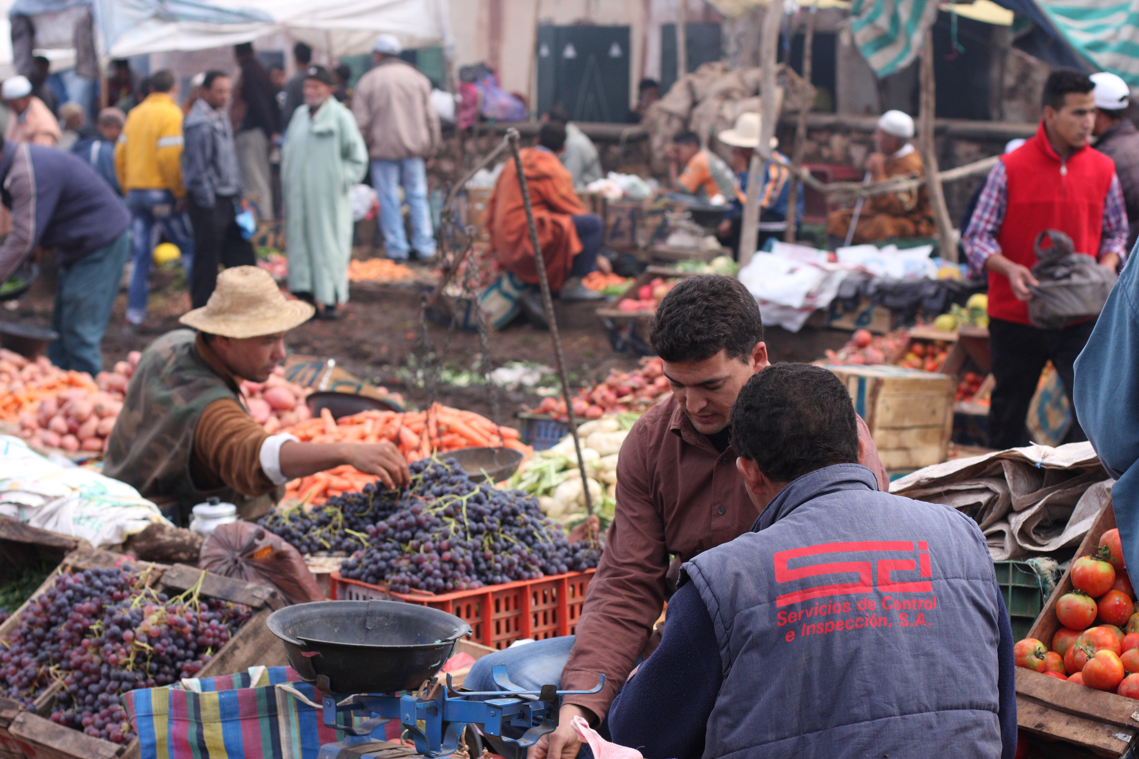 Asni, Morocco